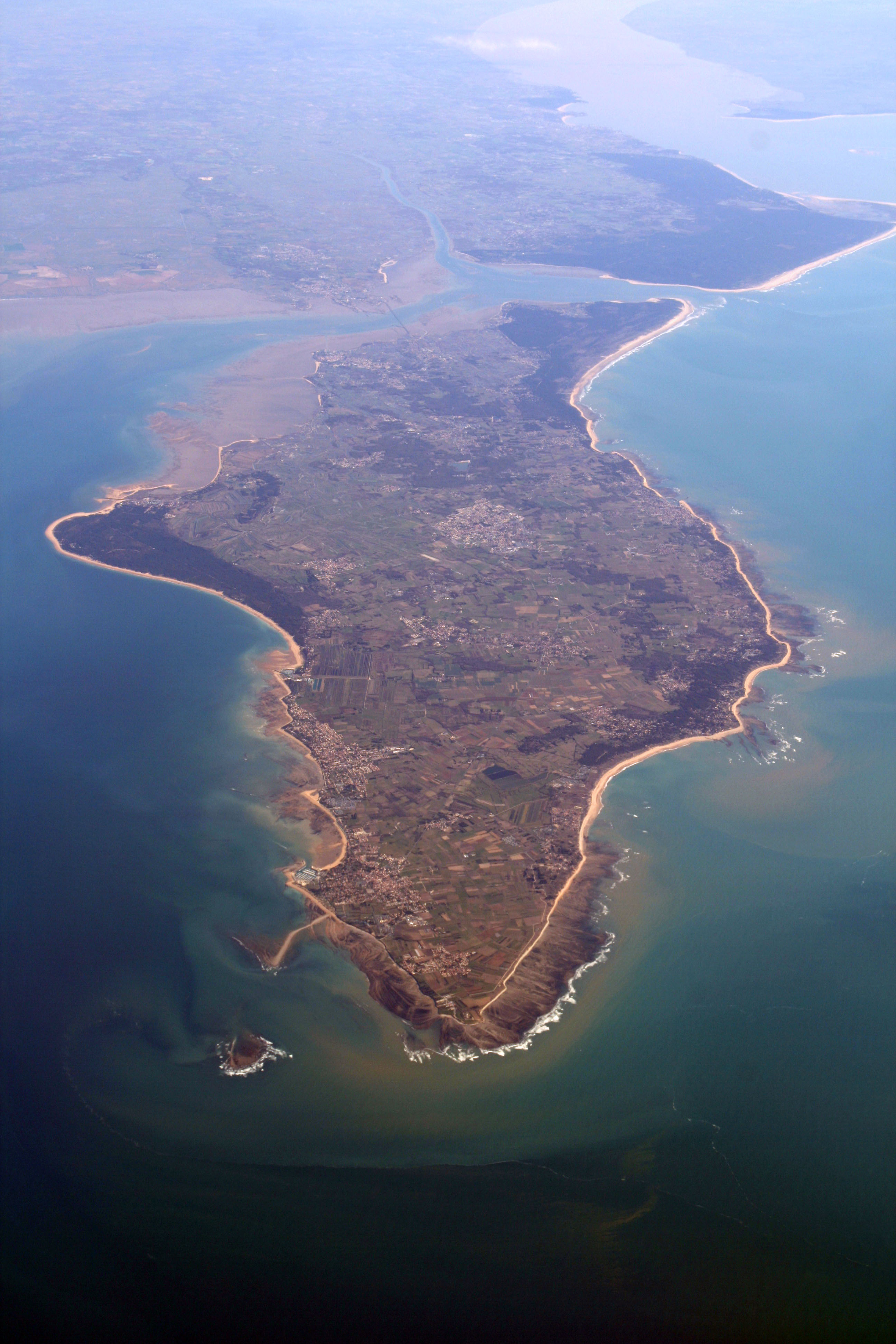 Luftbild, Blick von Nordwesten. Île d’Oléron, Frankreich.